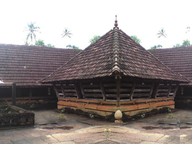 നമസ്കാര മണ്ഡപം